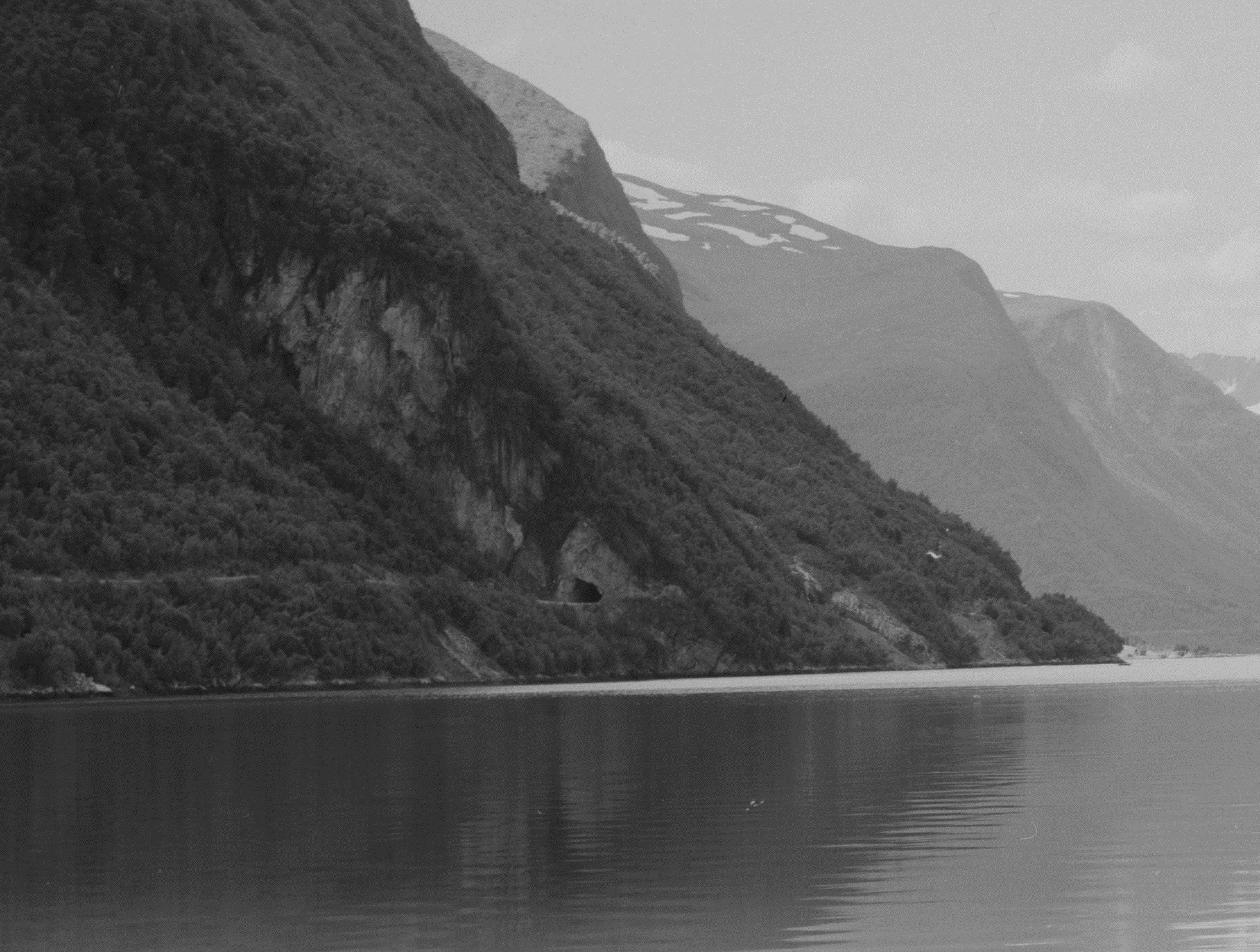 Bildet er hentet fra Nasjonalbibliotekets bildesamling Romsdalsfjorden,Veblungsnes, Rauma, Møre og Romsdal